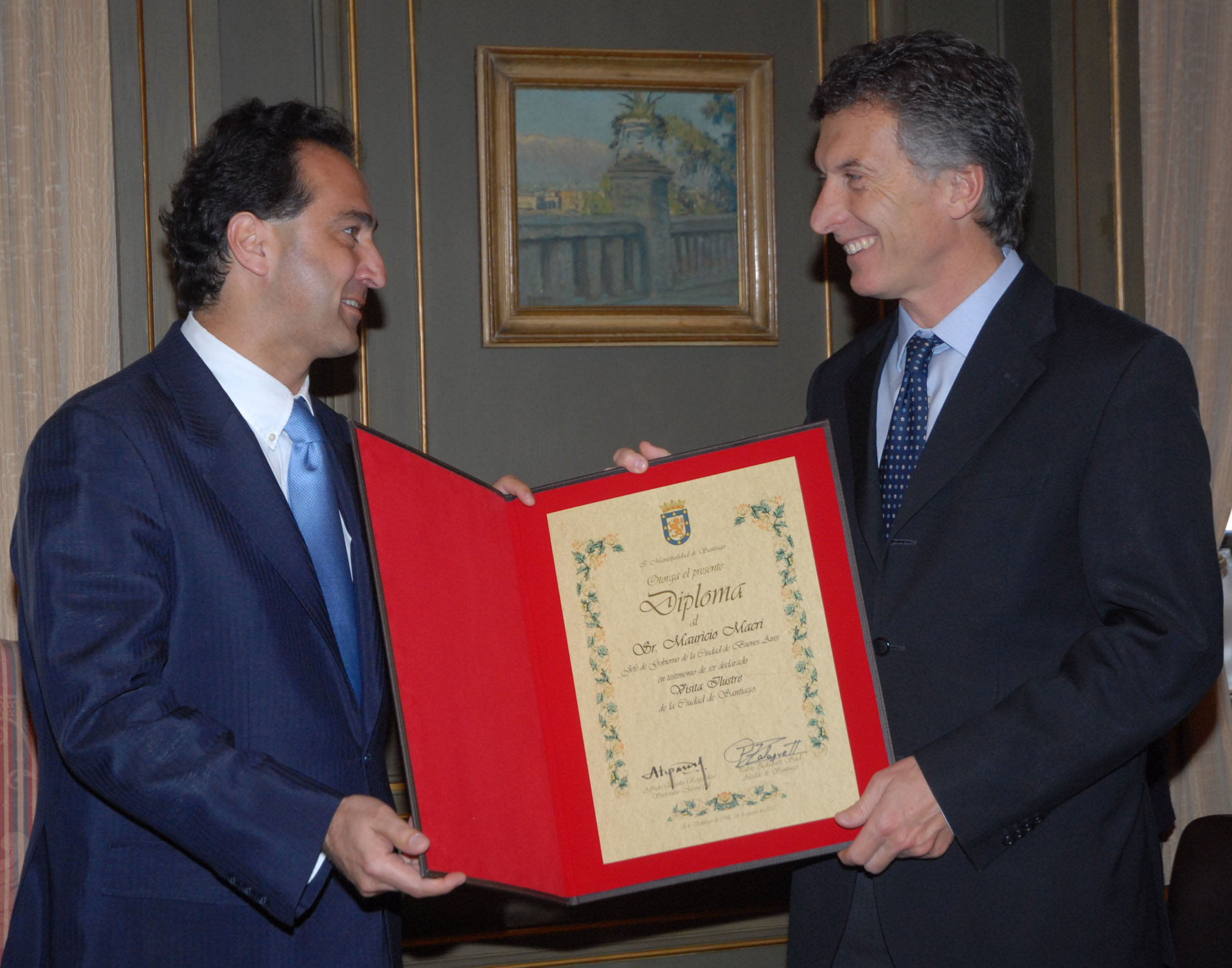 Mauricio Macri recibe el diploma de Visita Ilustre en Santiago de Chile de manos del alcalde Pablo Zalaquett.